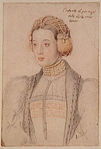 Portrait de Marie de Portugal (1521-1577)